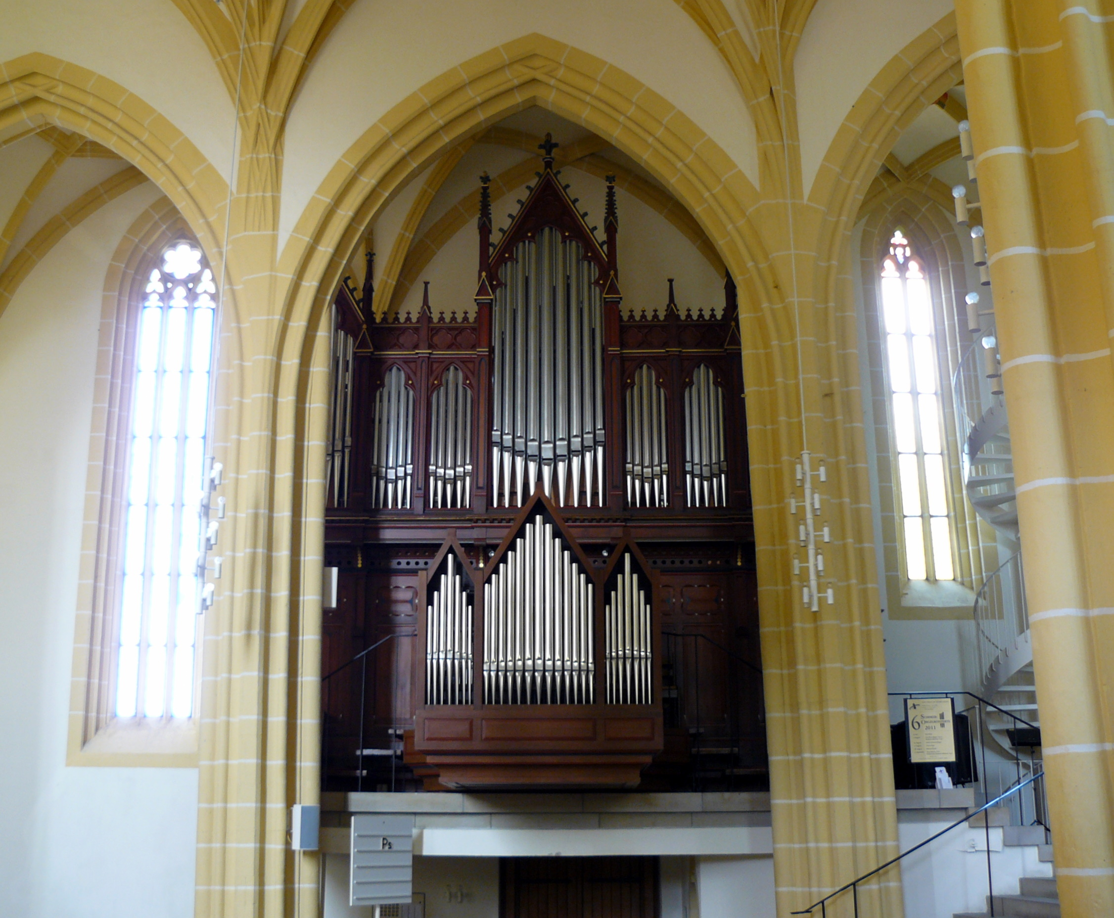 Orgel der evangelischen Stiftskirche Herrenberg